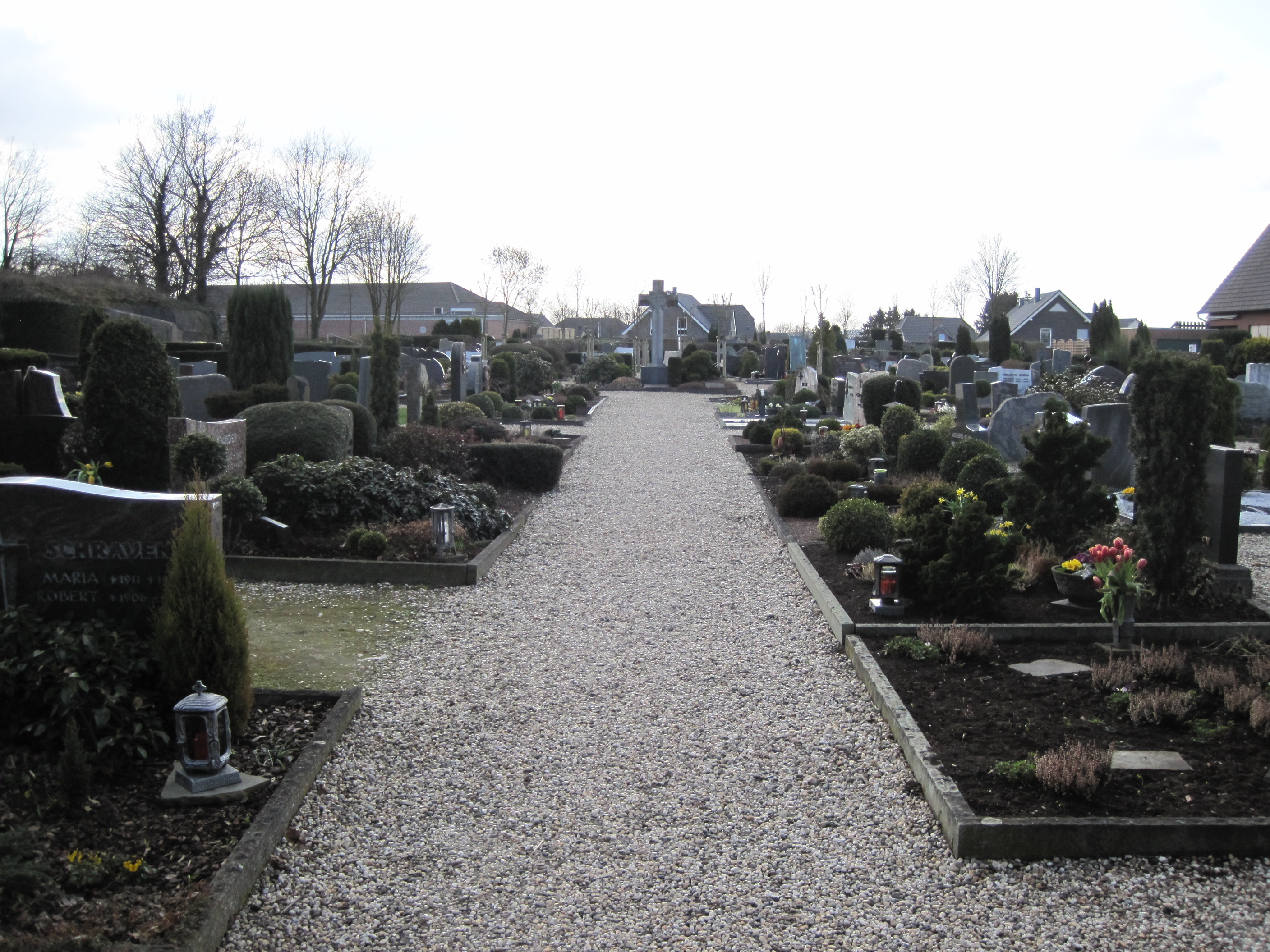 Kranenburg-Nütterden, Friedhof